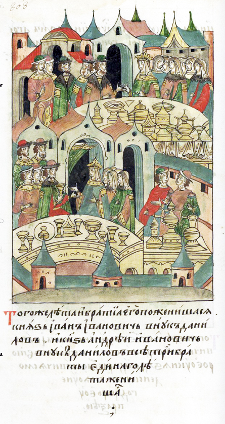 ЛИЦЕВОЙ ЛЕТОПИСНЫЙ СВОД В том году женились и братья его: князь Иван Иванович, внук Даниилов, и князь Андрей Иванович, внук Даниилов. Все три брата женились в один год.